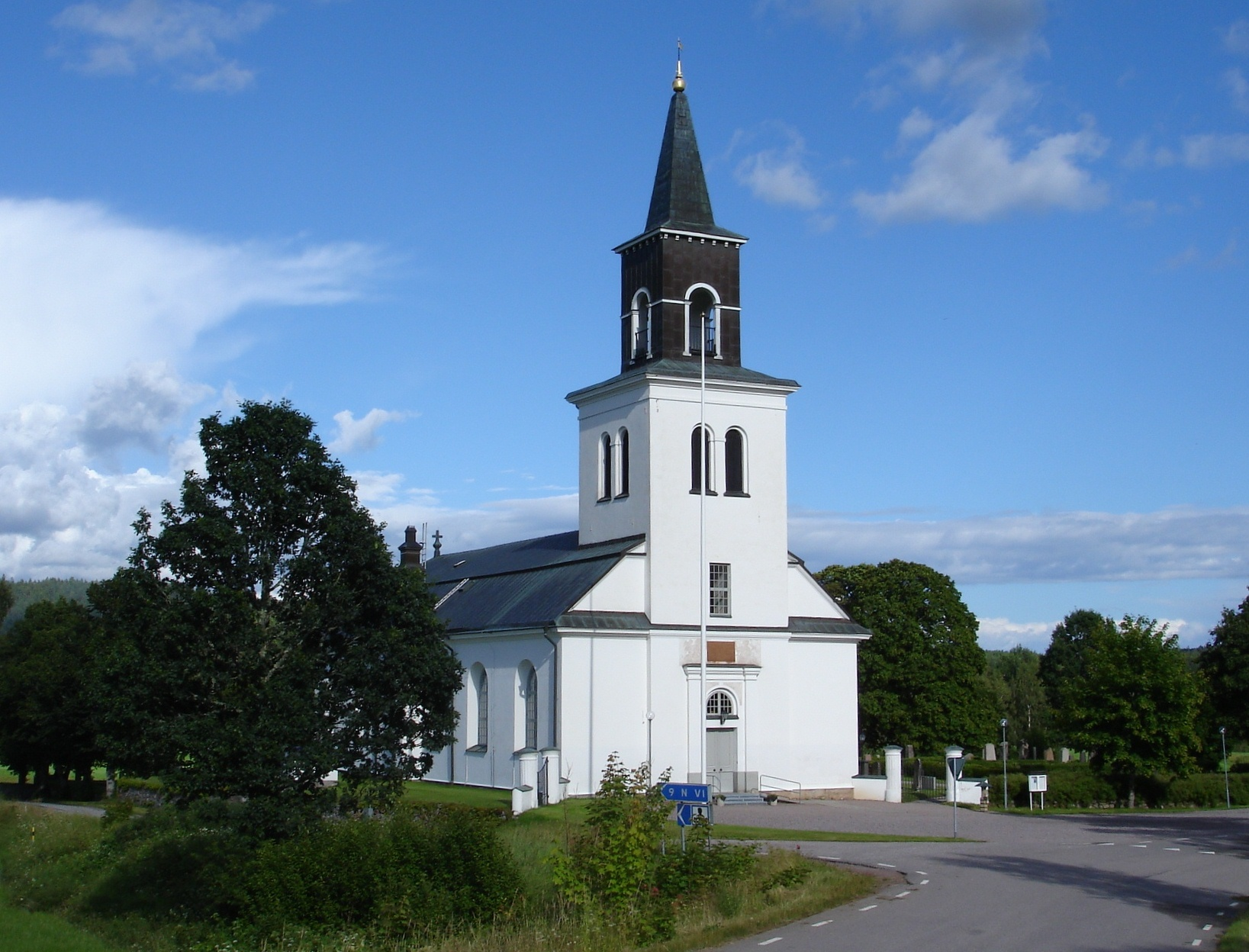 Sunds kyrka i Ydre kommun i Östergötland